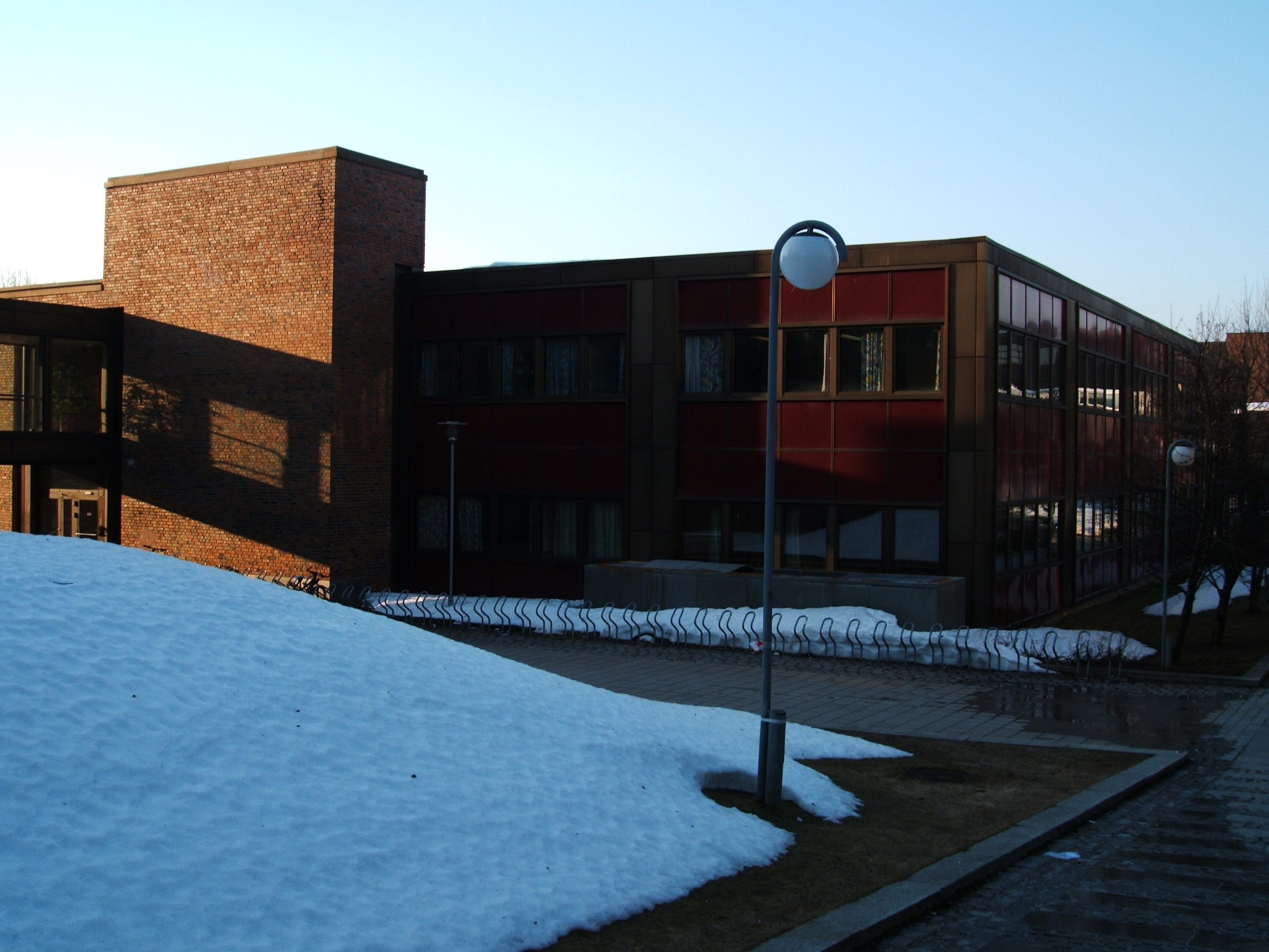 Matematisk- naturvitskapleg fakultet ved Universitetet i Tromsø